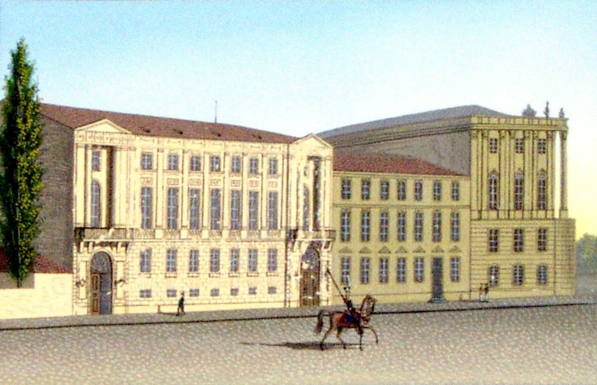 Witwenverpflegungsanstalt in der Behrenstraße um 1835, Umrisskupfer (koloriert)